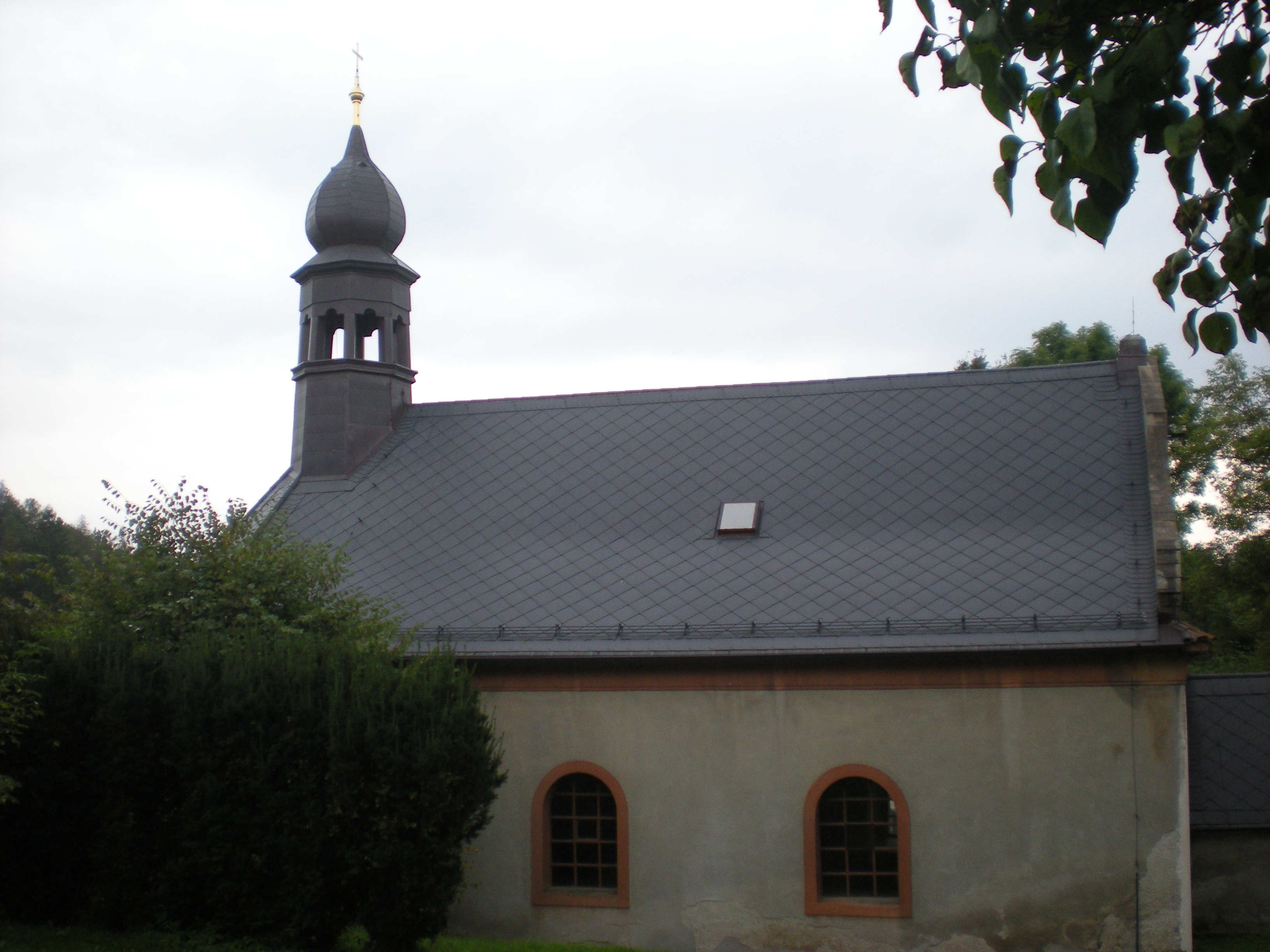 Kostel svatého Jakuba, Paběnice.